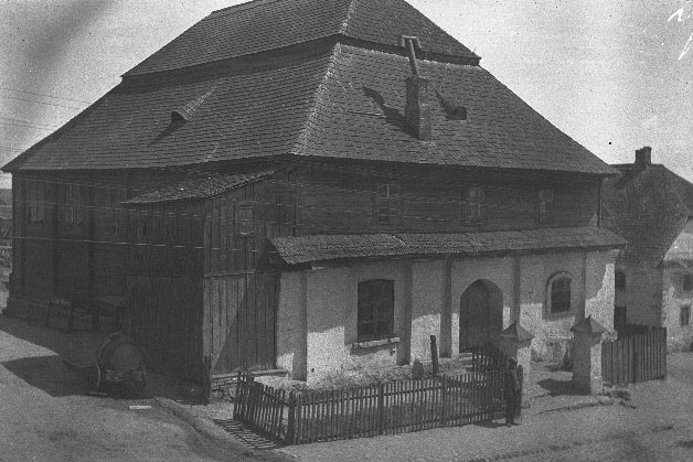 Беларуская (тарашкевіца): Глыбокае (Hłybokaje), вуліца Докшыцкая (vulica Dokšyckaja). Сынагога